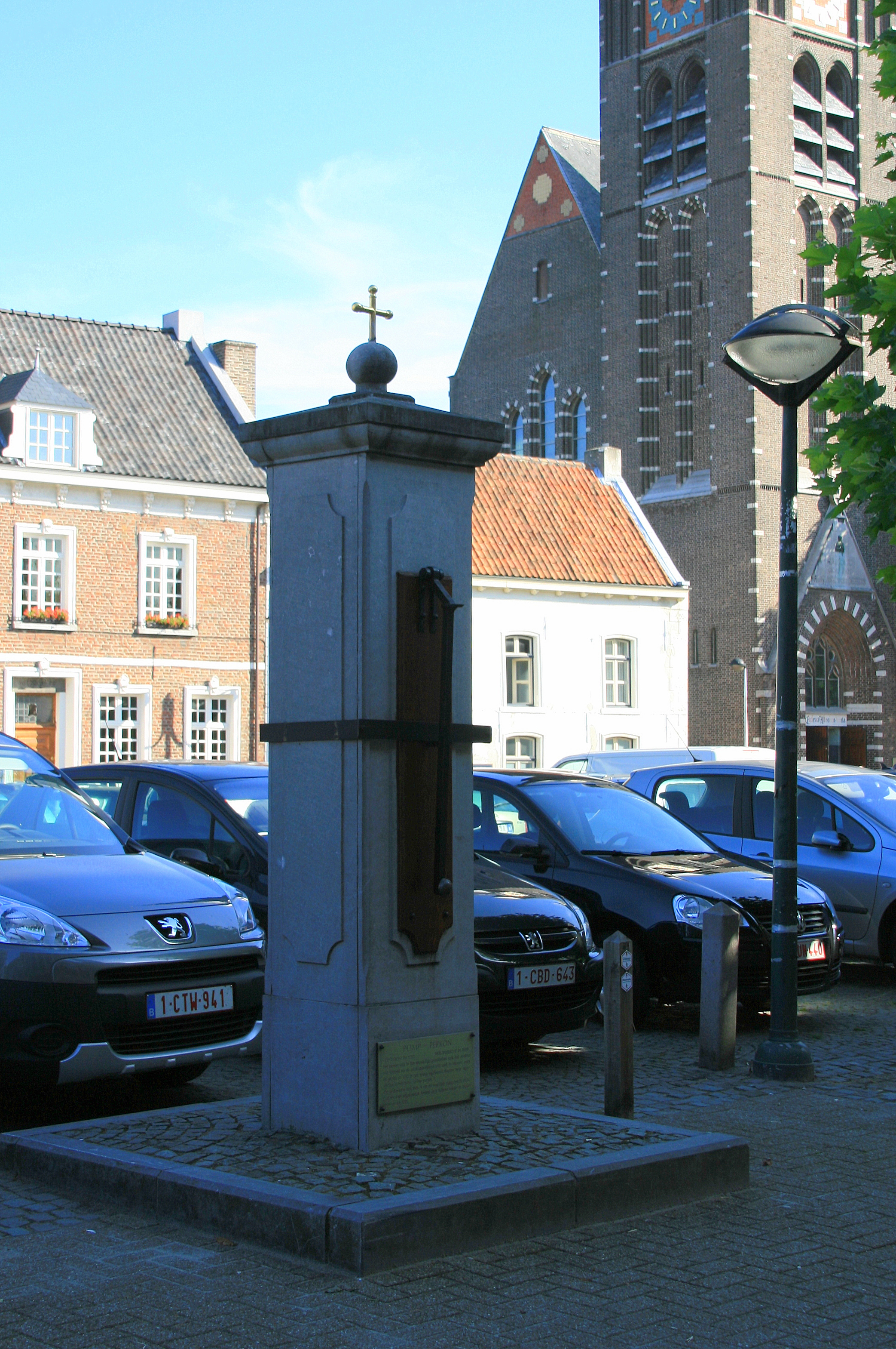 Pomp-perron van hardsteen, opgericht in 1782, met toestemming en financiële steun van de Staten van Luik, vernield in 1944 en ongeveer op dezelfde plaats gereconstrueerd in 1989. Vierkante stadspomp en -paal, symbool van de stedelijke vrijheid in het land van Luik. Tevens kaak of schandpaal met halsbeugel. Voorzijde met toenmalig stadswapen van Carraramarmer, geflankeerd door akanten en voorzien van inscriptie: ANTOON SMEETS/JAN BALLEINE, burgemeesters in 1782.